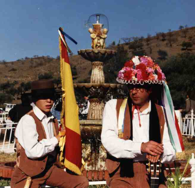 Panda de Almogia